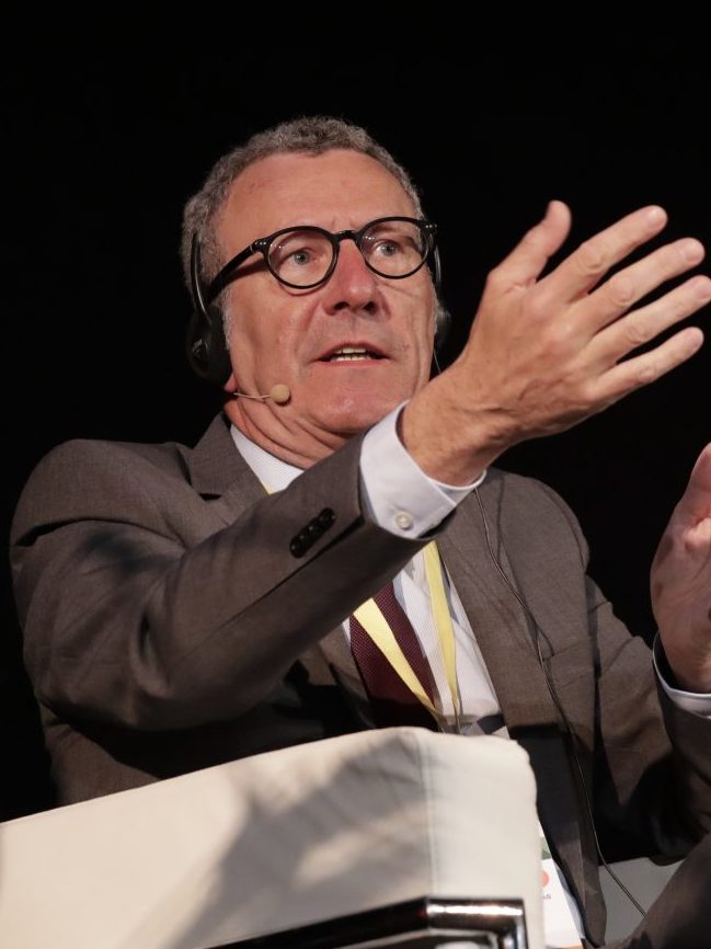 Con los atentados de Londres, París o Bruselas muy presentes en el debate, los ponentes de la mesa sobre Violencia por Terrorismo Internacional, entre los que se encontraban la alcaldesa de Madrid, Manuela Carmena, y sus homólogos de Bruselas, Berlín, Trípoli y Montreal, coincidieron en señalar la falta de identidad como uno de los principales caldos de cultivo del terrorismo islámico en Europa.